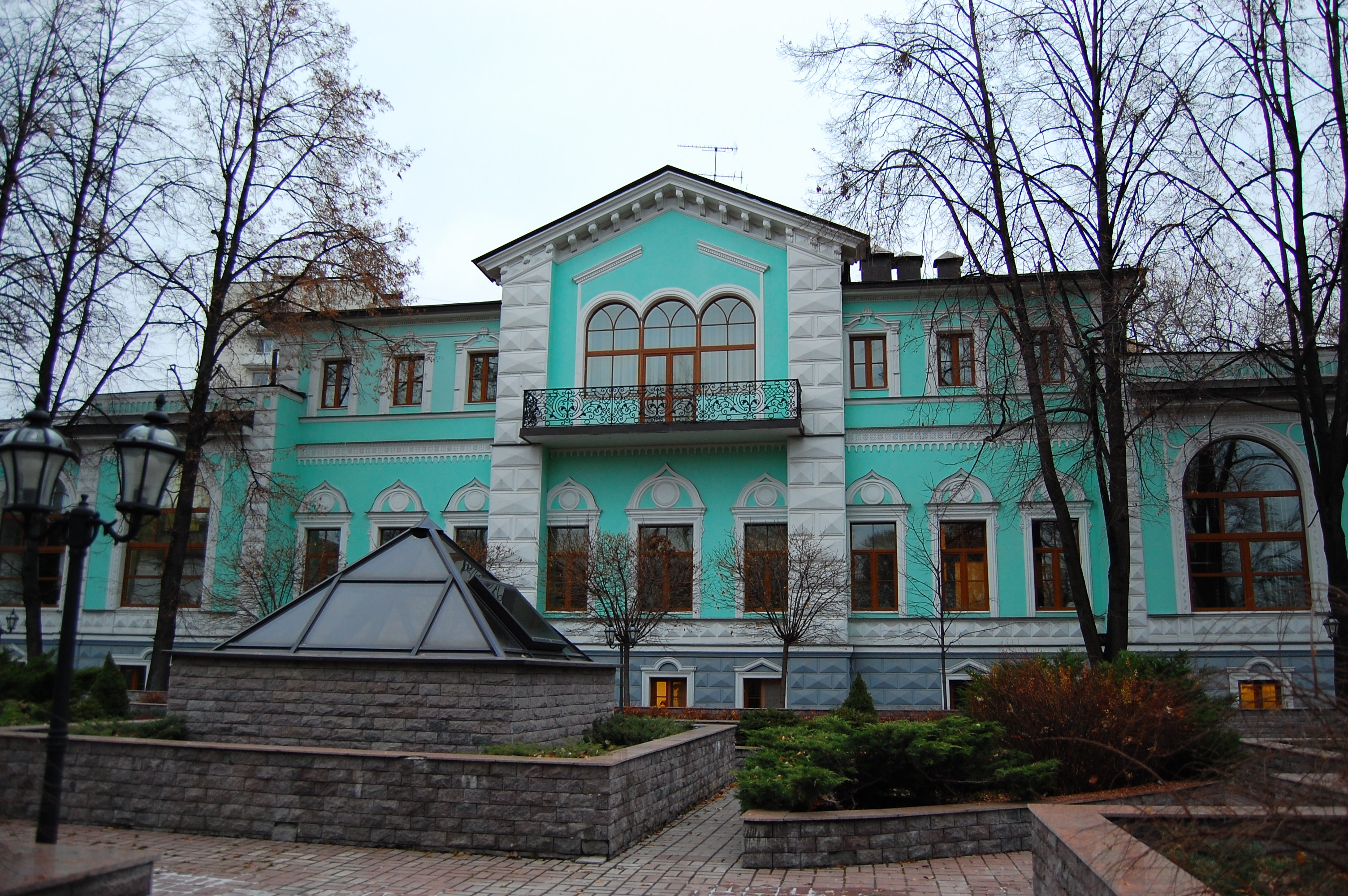 Дом Морозовой в Морозовском саду